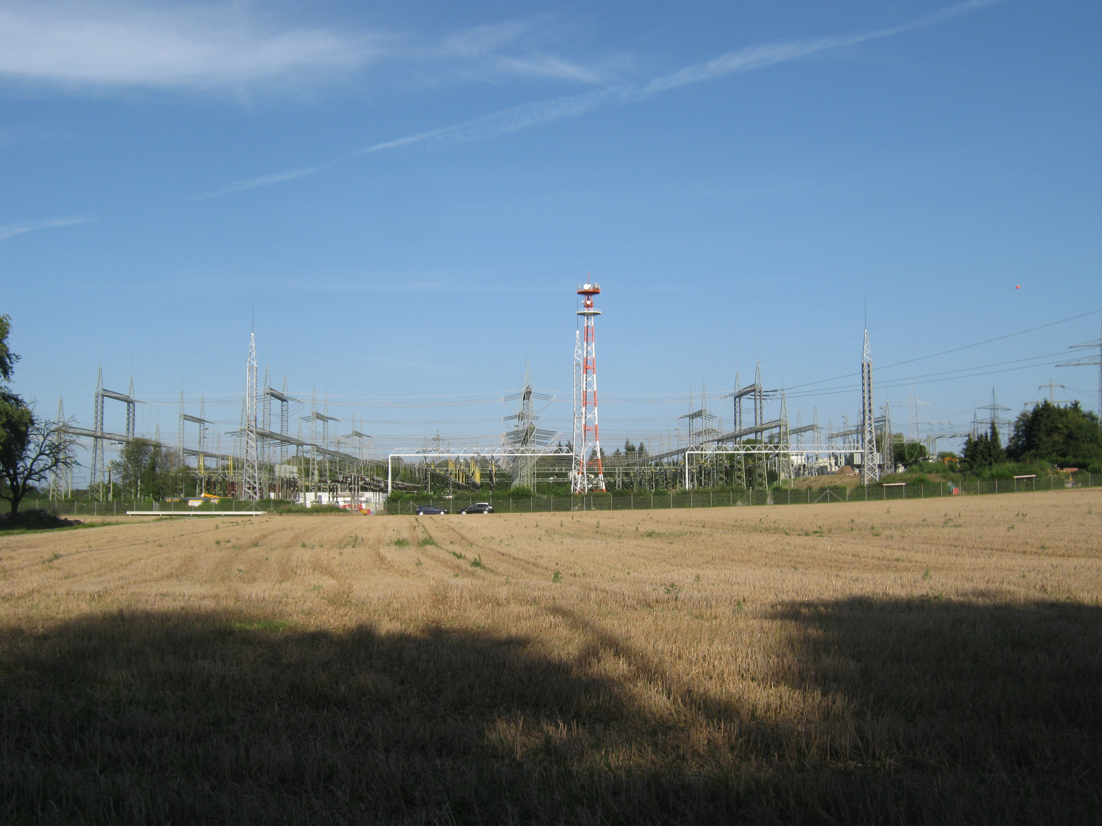 380-kV-Schaltanlage des Umspannwerks Hoheneck (Amprion)